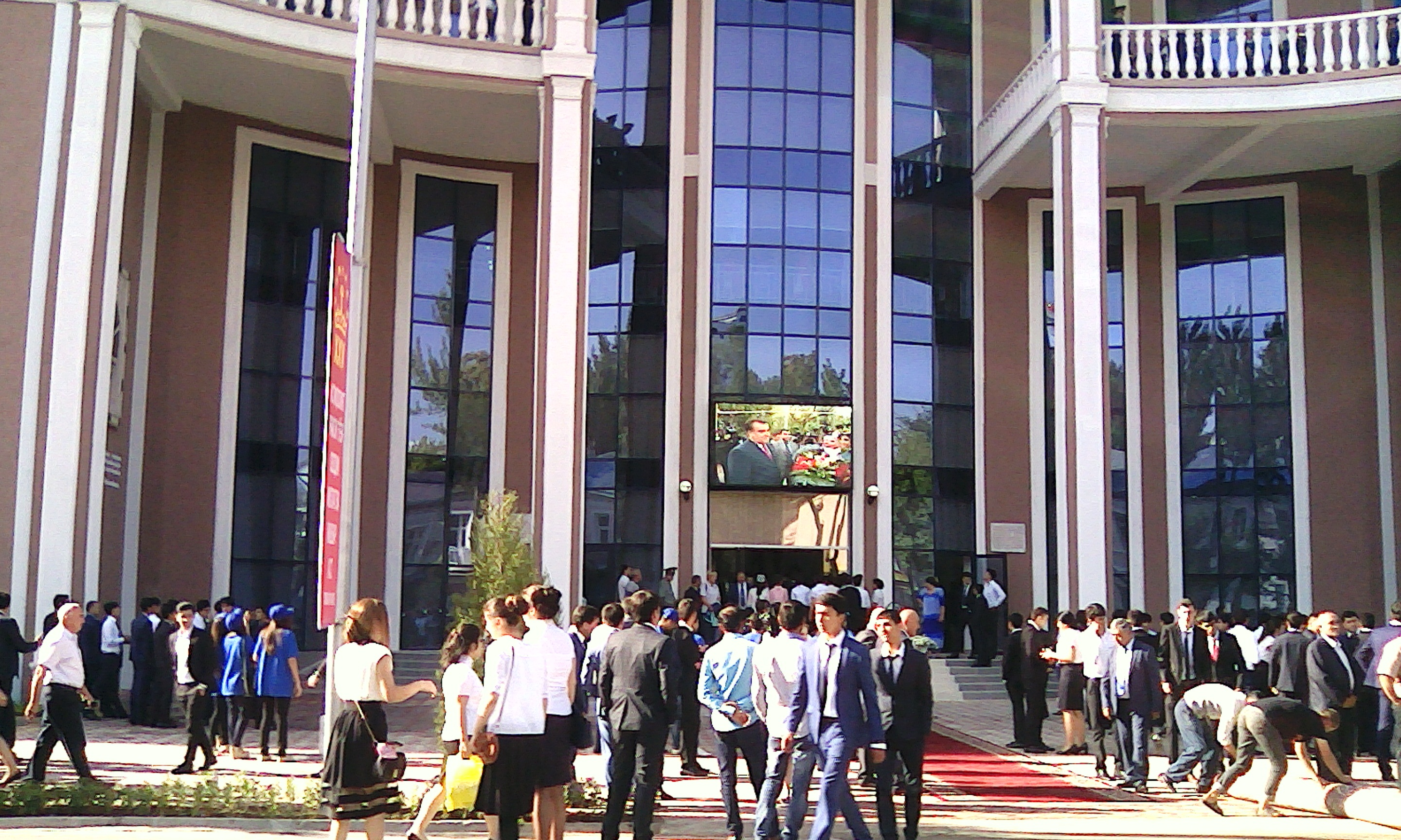 Новый корпус РТСУ, г. Душанбе